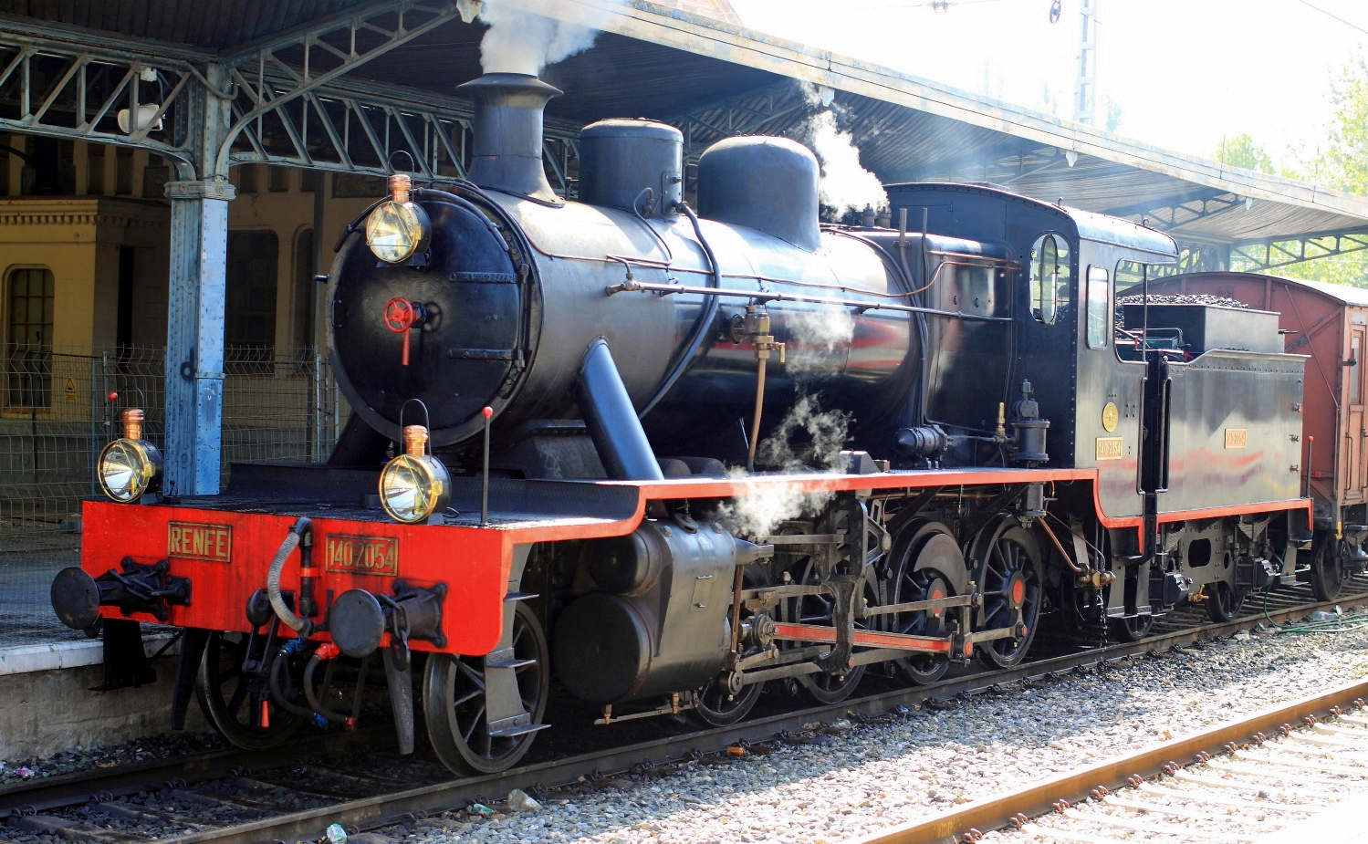 Locomotora Renfe 140 T "Guadix" a la espera de la hora de iniciar el retorno al MNF de Madrid.